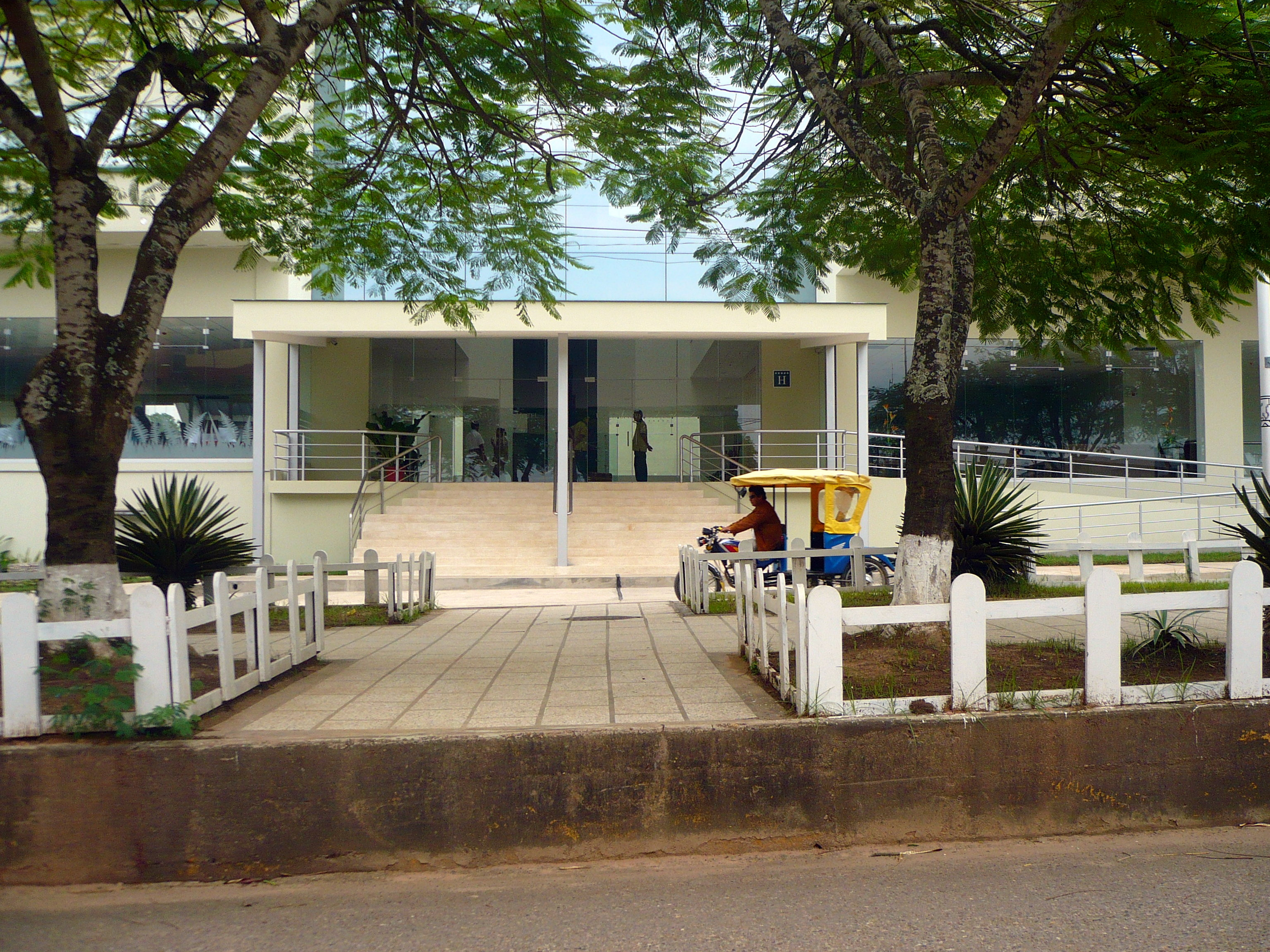 Entrada de Ucayali River Hotel al frente.